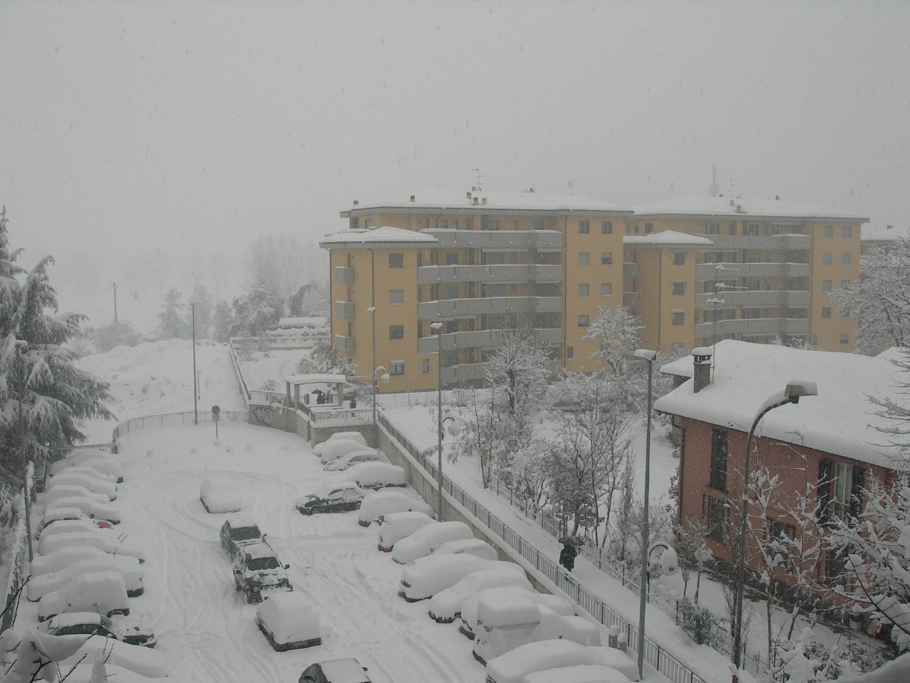 Lodi, Lombardia, Italia